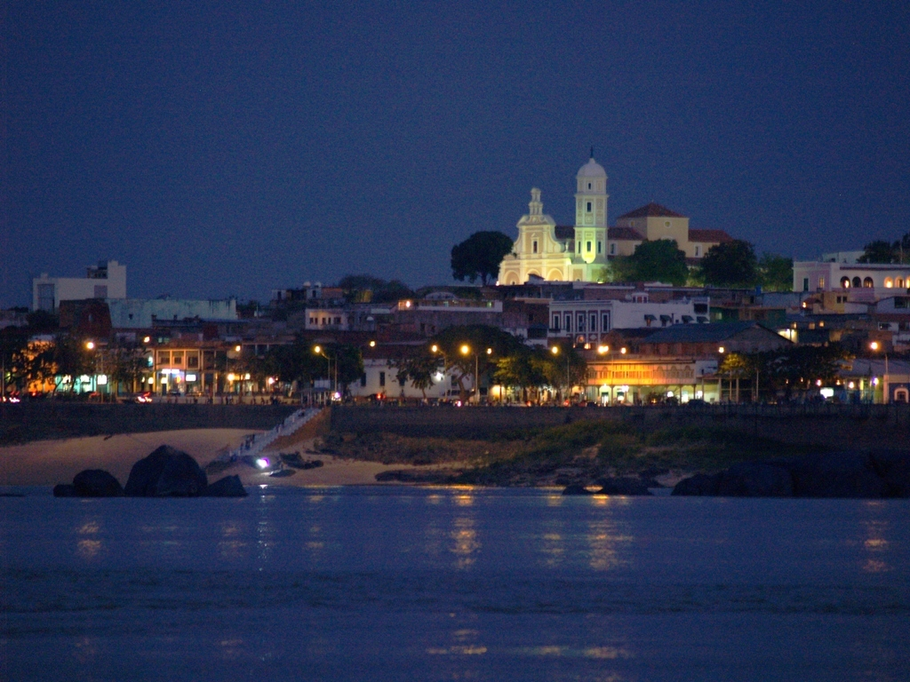 Ciudad Bolivar, Capital del estado Bolivar. Catedral de Ciudad Bolivar y Paseo Orinoco de Noche